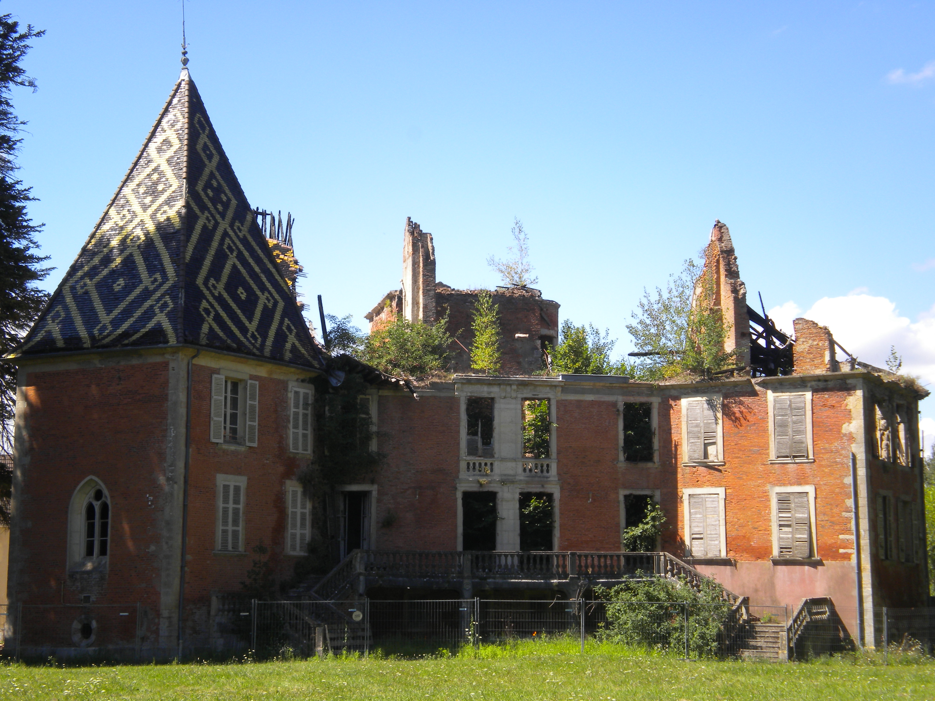 Photographie de la façade du château des Maillys (côté jardin), prise le 30 juillet 2012